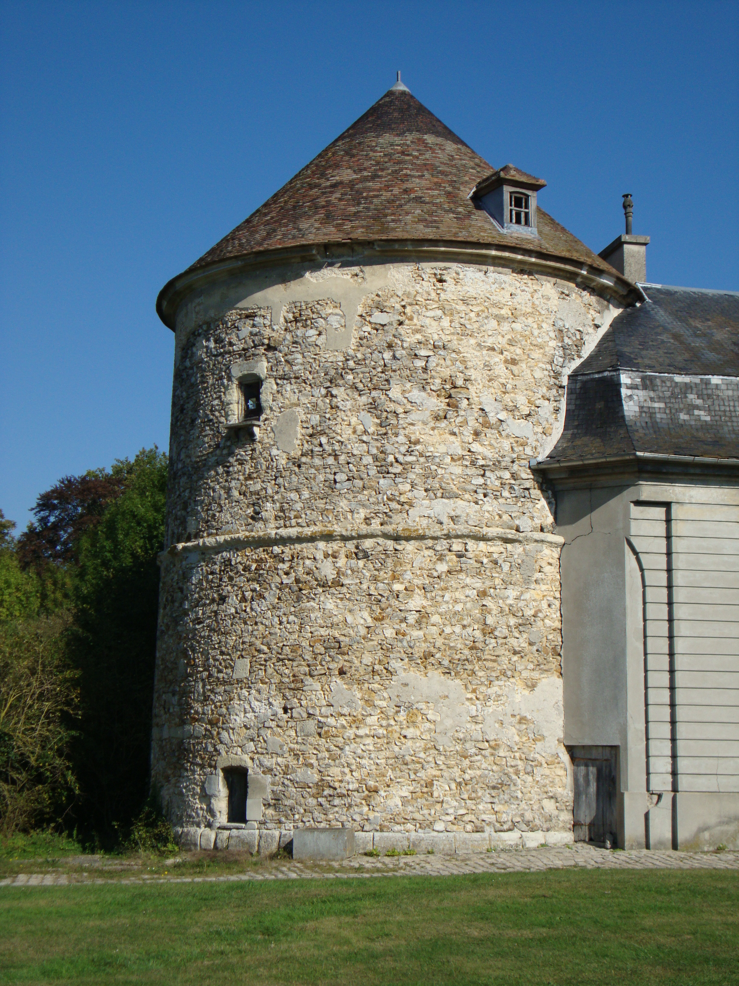 L85 - Pigeonnier dans le parc du château de Brou-sur-Chantereine .